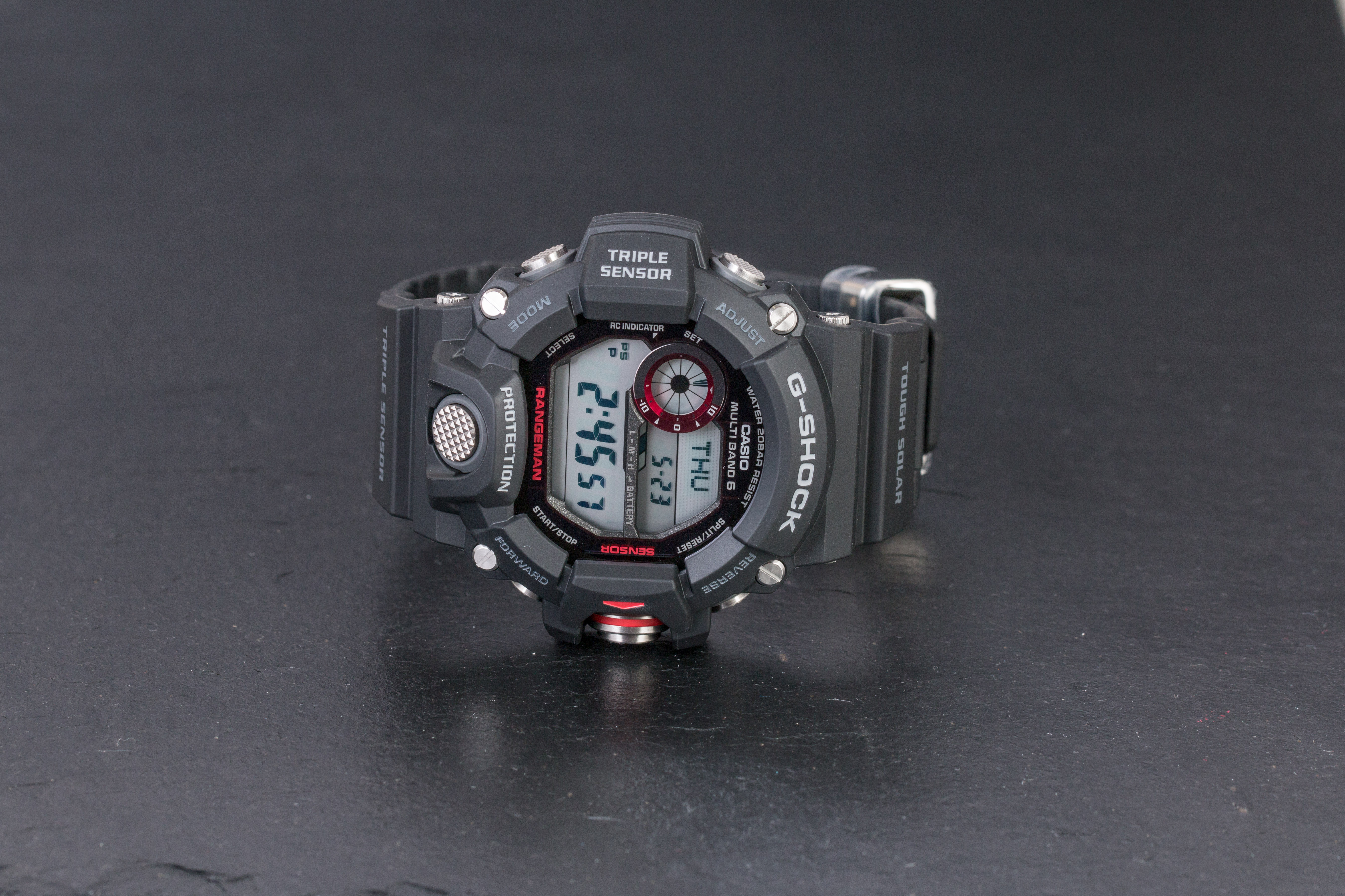 Digitálne hodinky Casio